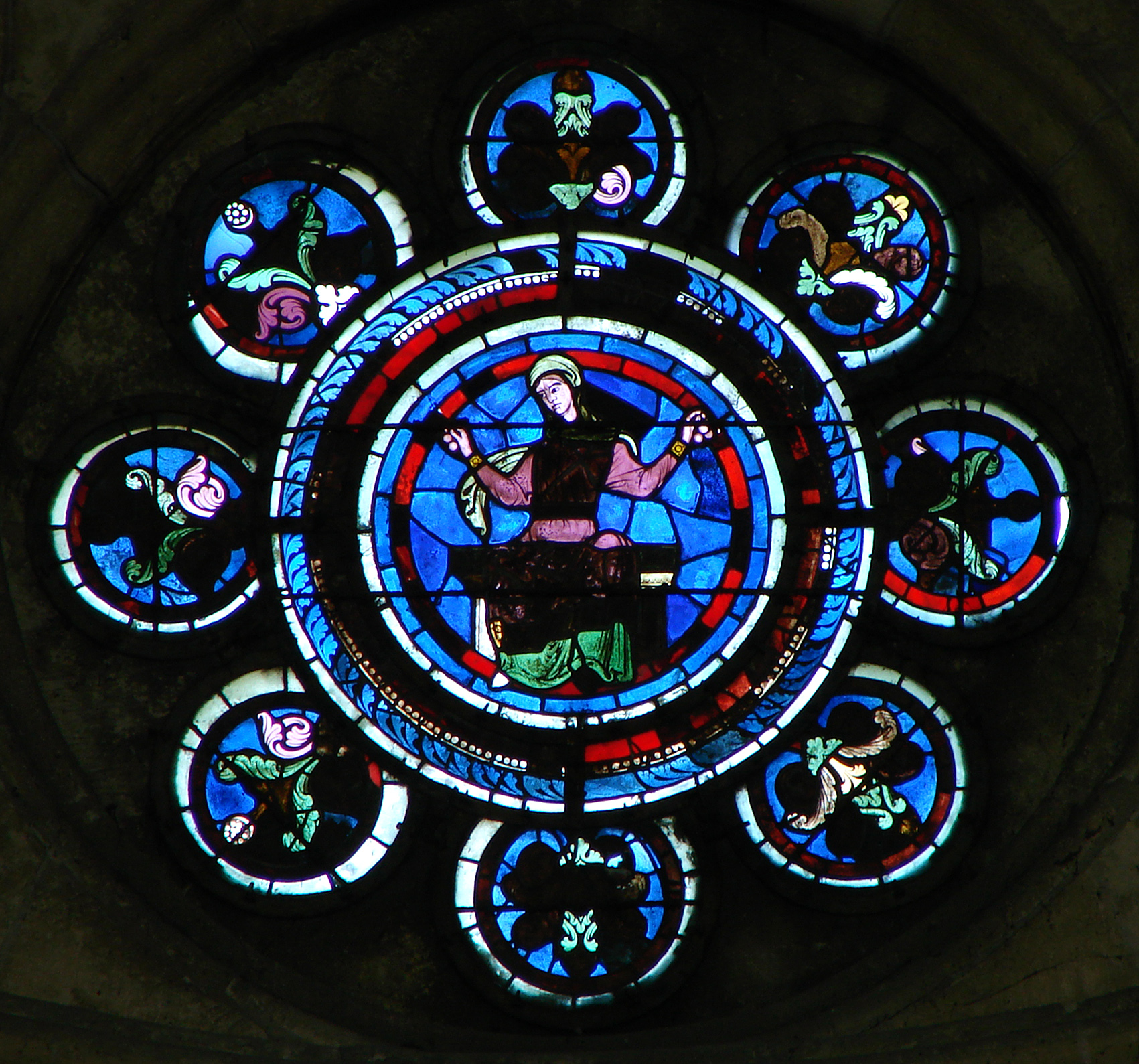 L'Arithmétique (1200-1210), médaillon de la rose du transept Nord de la cathédrale Notre-Dame de Laon: la Rose des Arts libéraux. (Les médaillons représentent les 7 arts libéraux, auxquels ont été ajoutées la Médecine et la Philosophie (médaillon central). Le vitrail date de 1200 à 1210, mais quatre médaillons ont été réalisés par Adolphe Charles Edouard Steinheil en 1865 (la Philosophie, la Rhétorique, la Musique, la Médecine); il a repris les figures des voussures d'un portail de la façade, consacrées elles aussi aux Arts libéraux). (Source: le site du Ministère de la Culture)